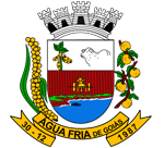 Brasão de Água Fria de Goiás, Brasil.